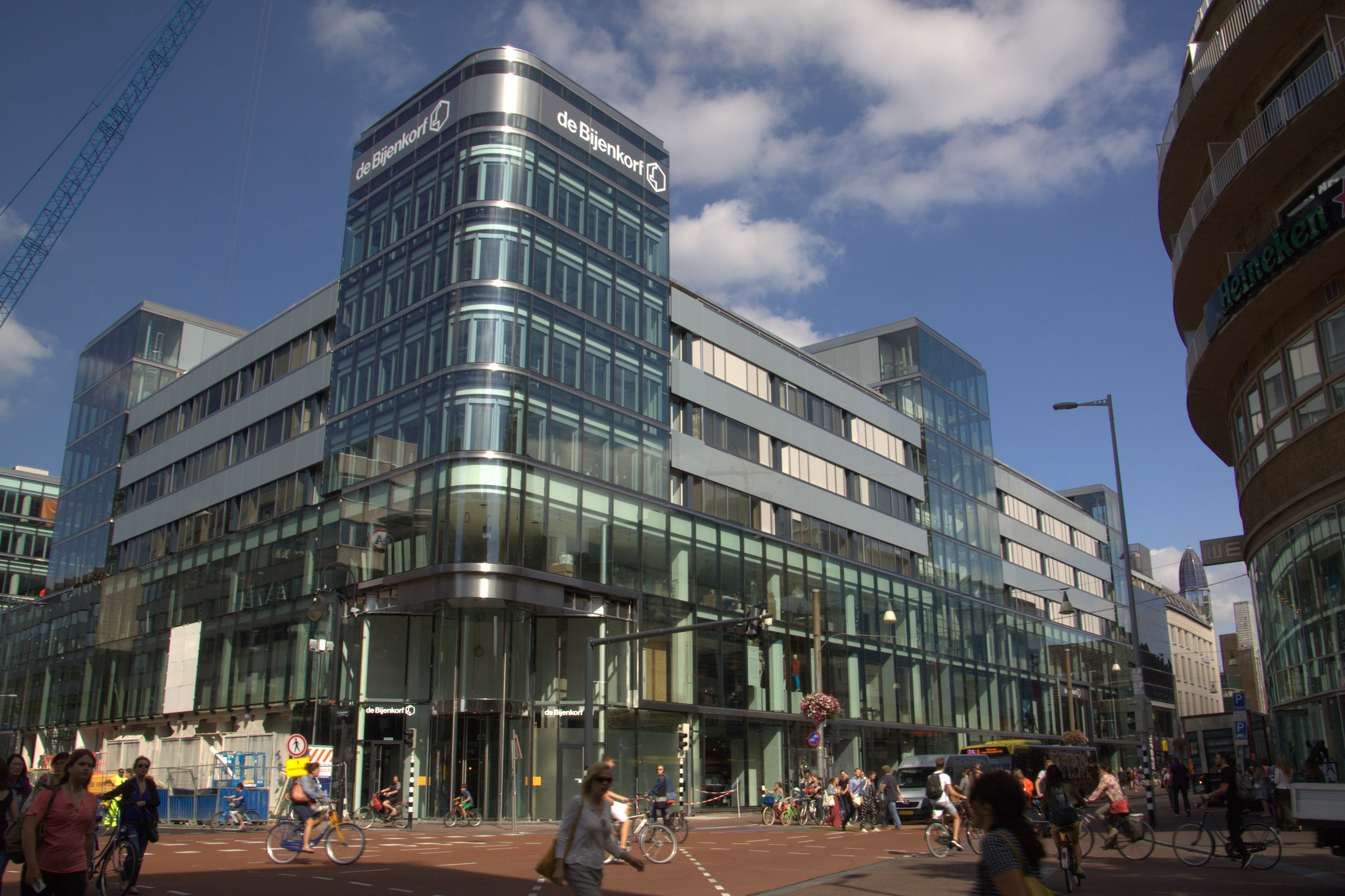 De Lange Viestraat in Utrecht op een zonnige Septemberdag.